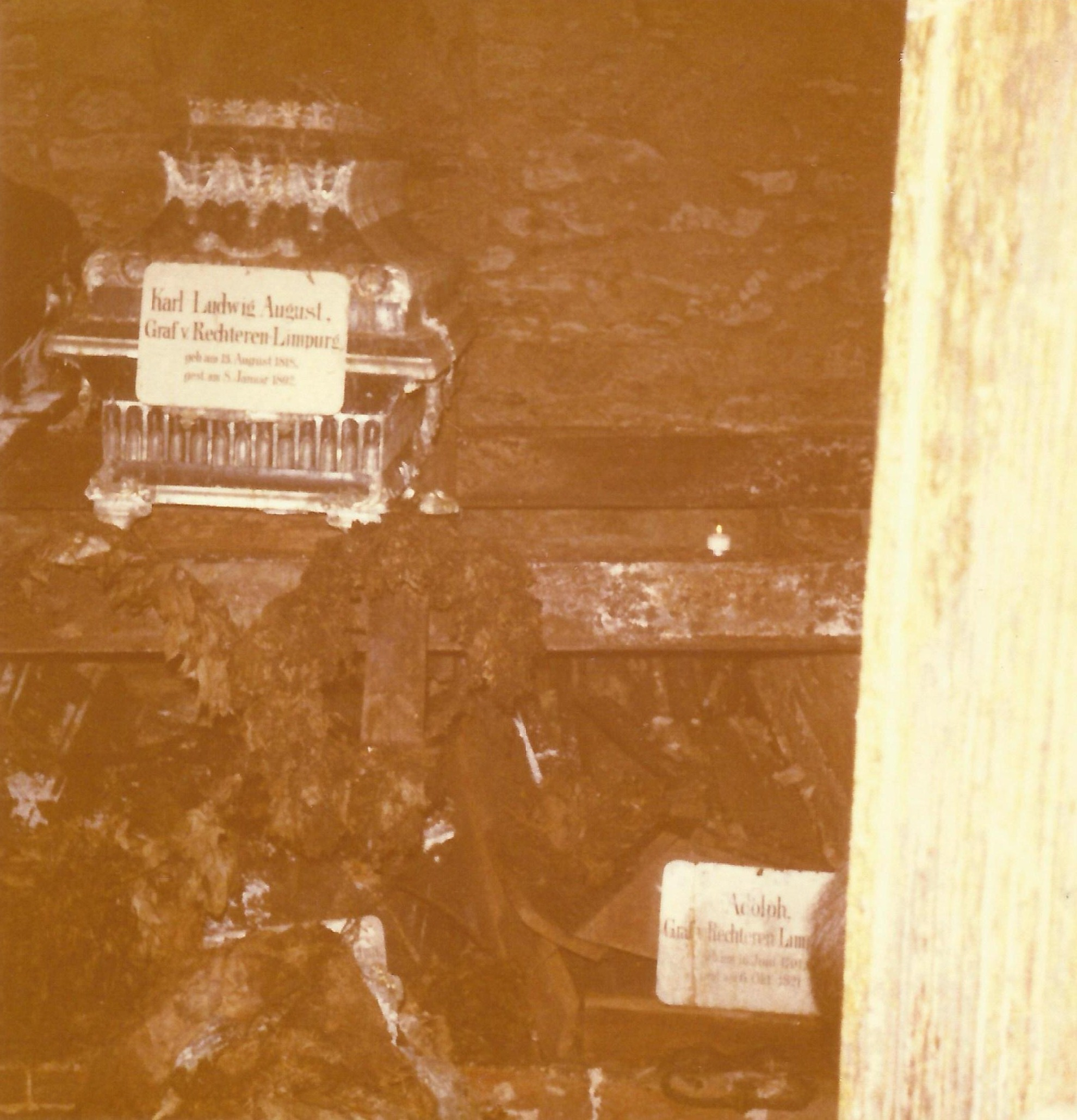 Vor der Versiegelung entstandene Aufnahme aus dem Inneren der Gruft der Matthäuskirche in Markt Einersheim, 1970er Jahre.